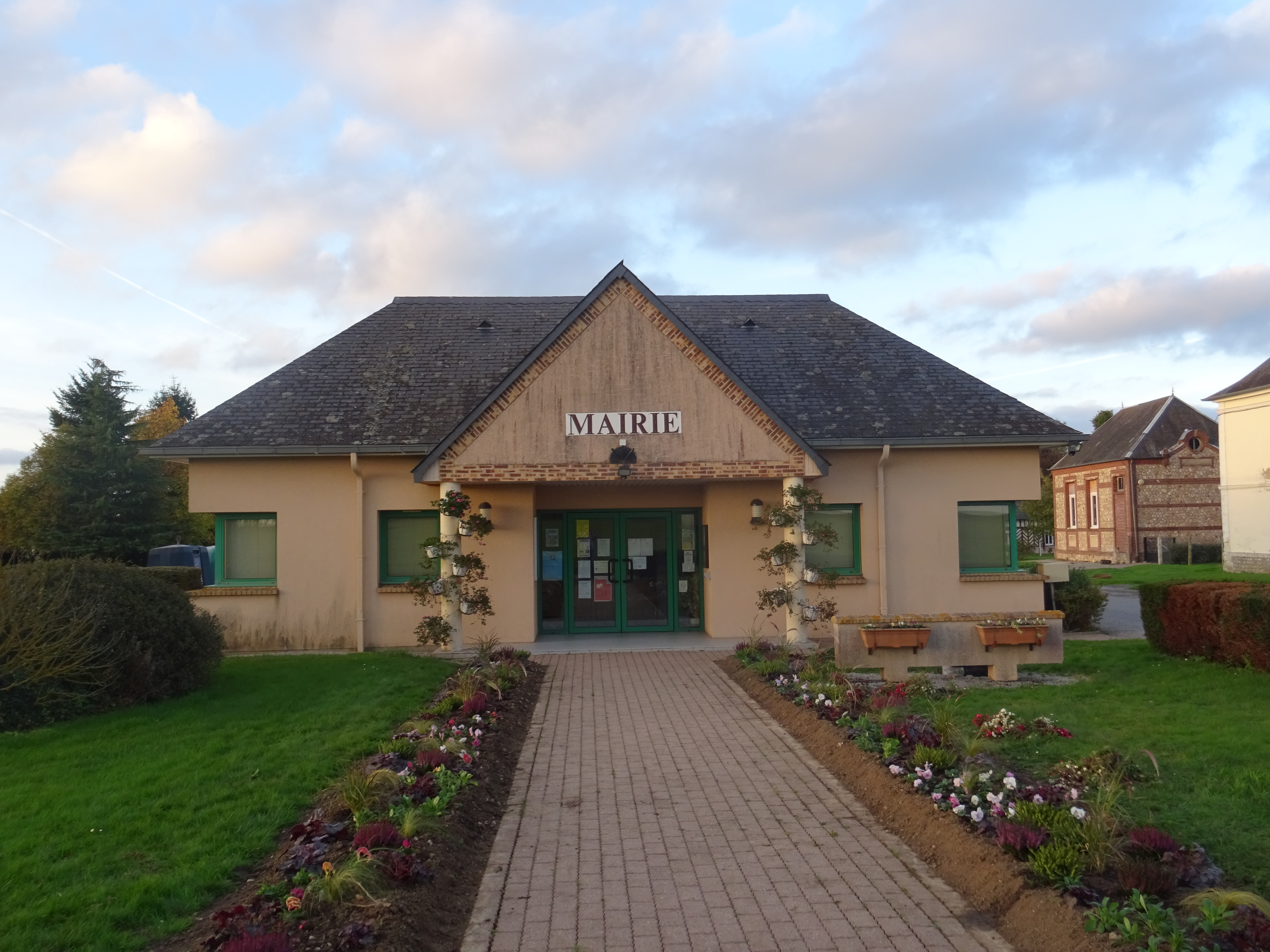 Mairie de Thierville (Eure - France)